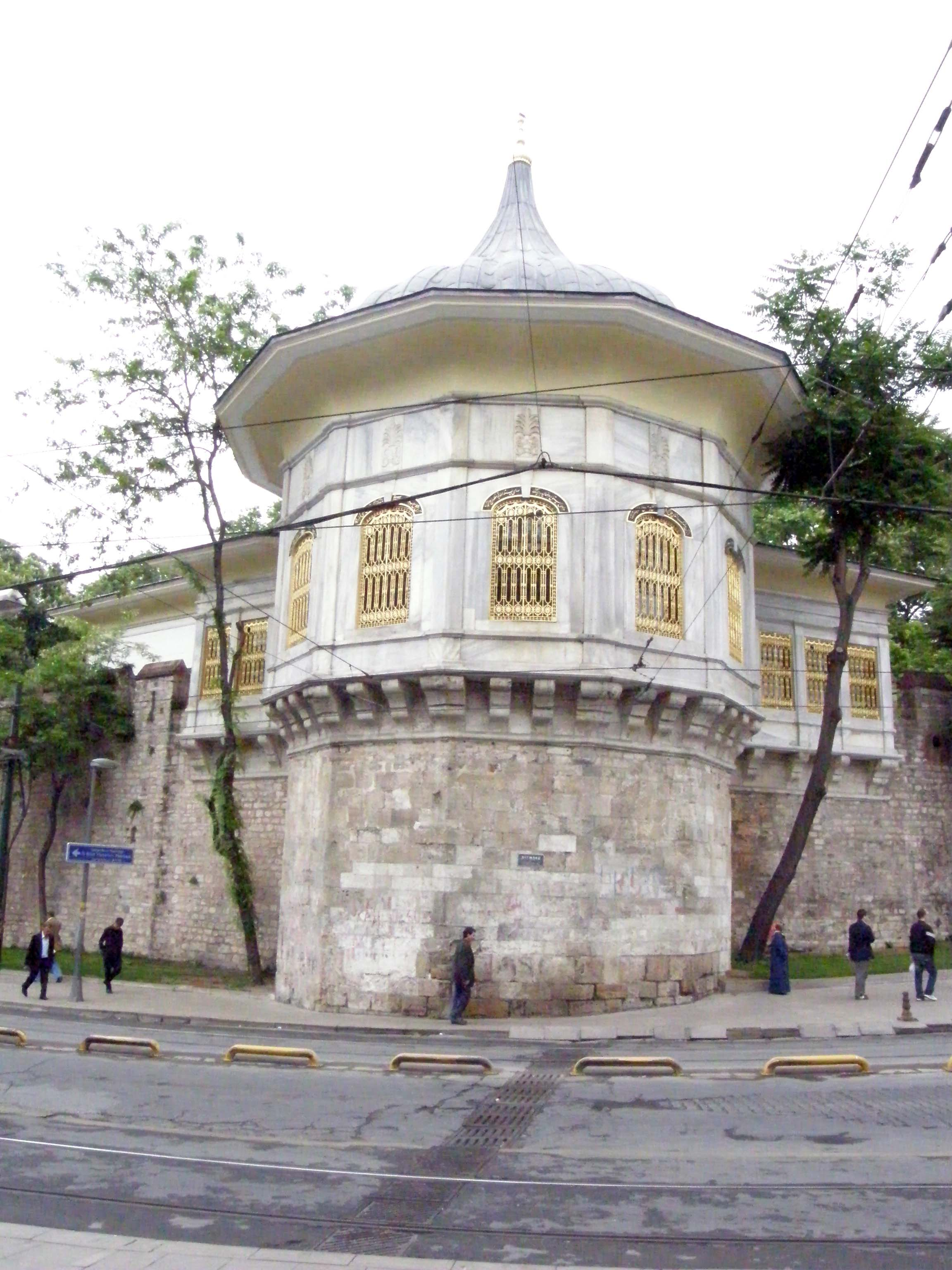 Alay Köşkü İstanbul Topkapı sarayı dış surlarında